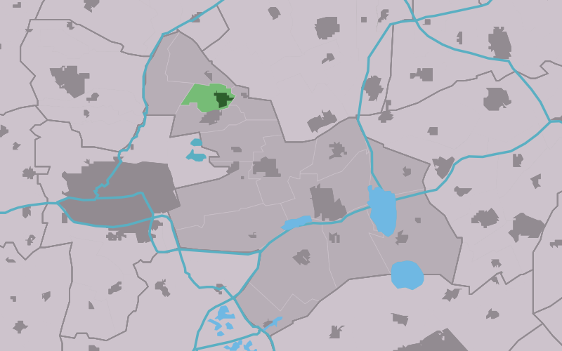 Kaartsje fan himrik fan Oentsjerk